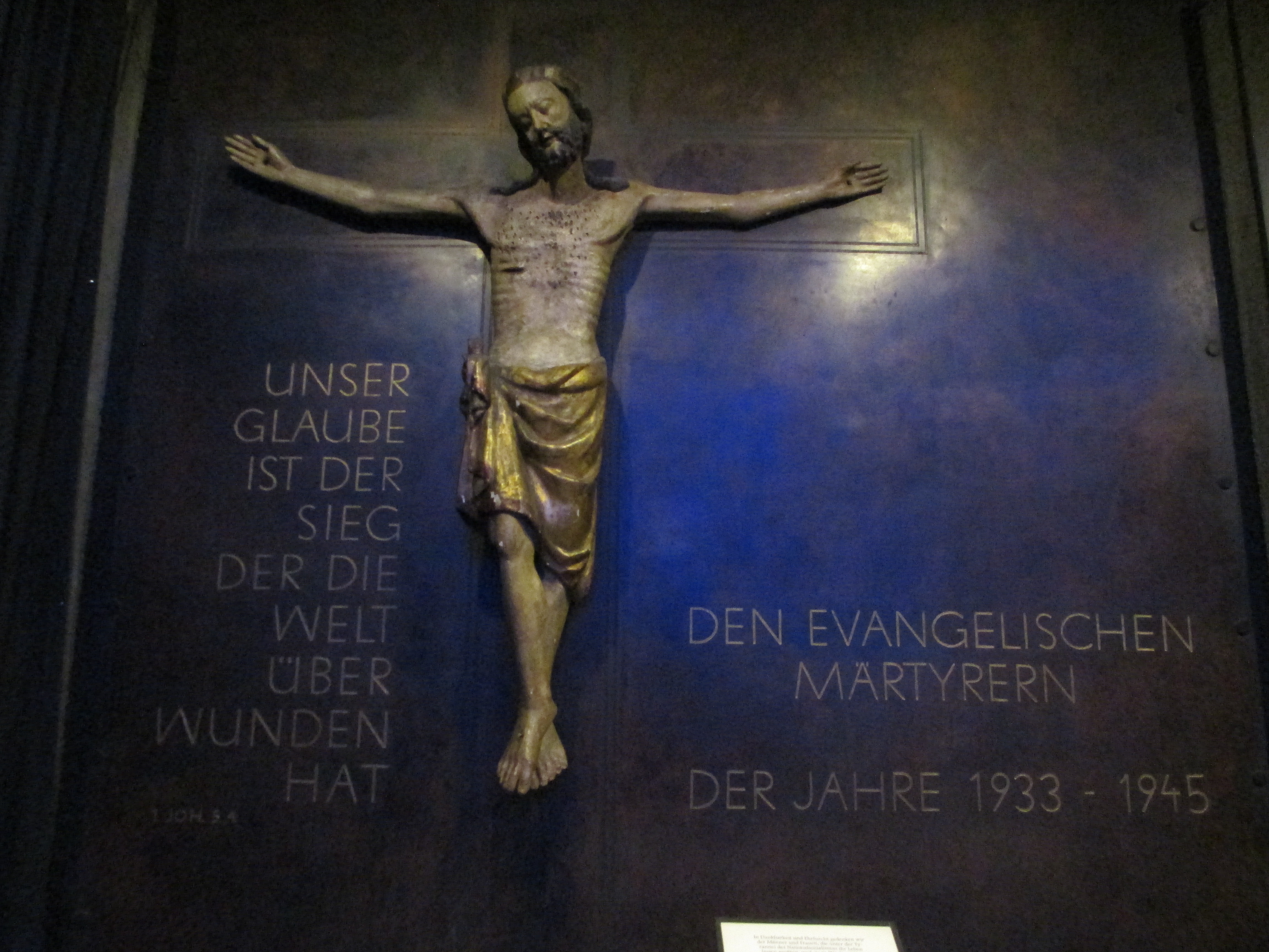 אתר זיכרון לקרבנות אנשי כנסייה פרוטסטנטים בכנסיית הזיכרון ע"ש קייזר וילהלם בברלין